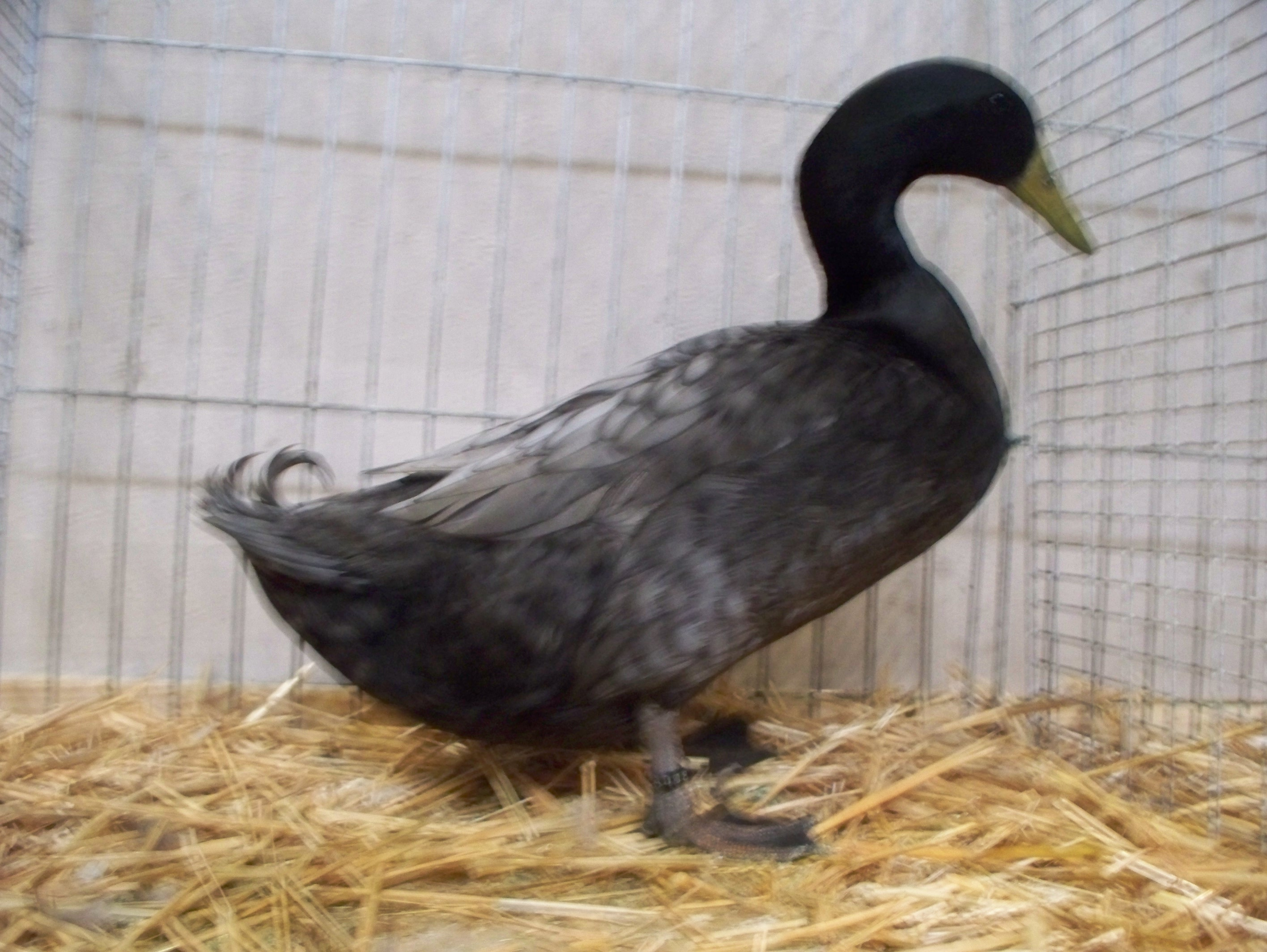 Erpel der Gimpsheimer Enten